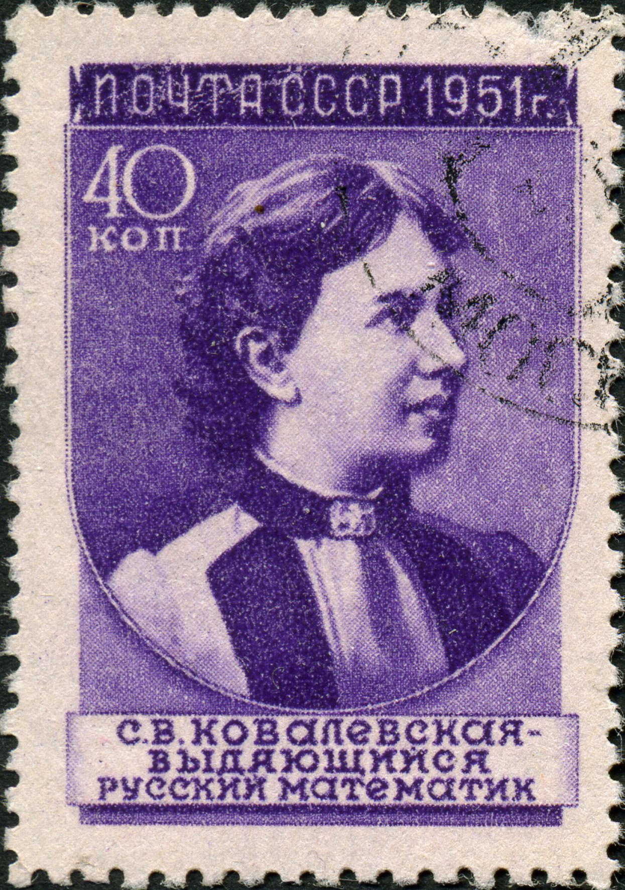 Марка СССР